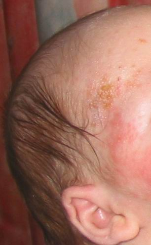 Milchschorf bei einem Baby